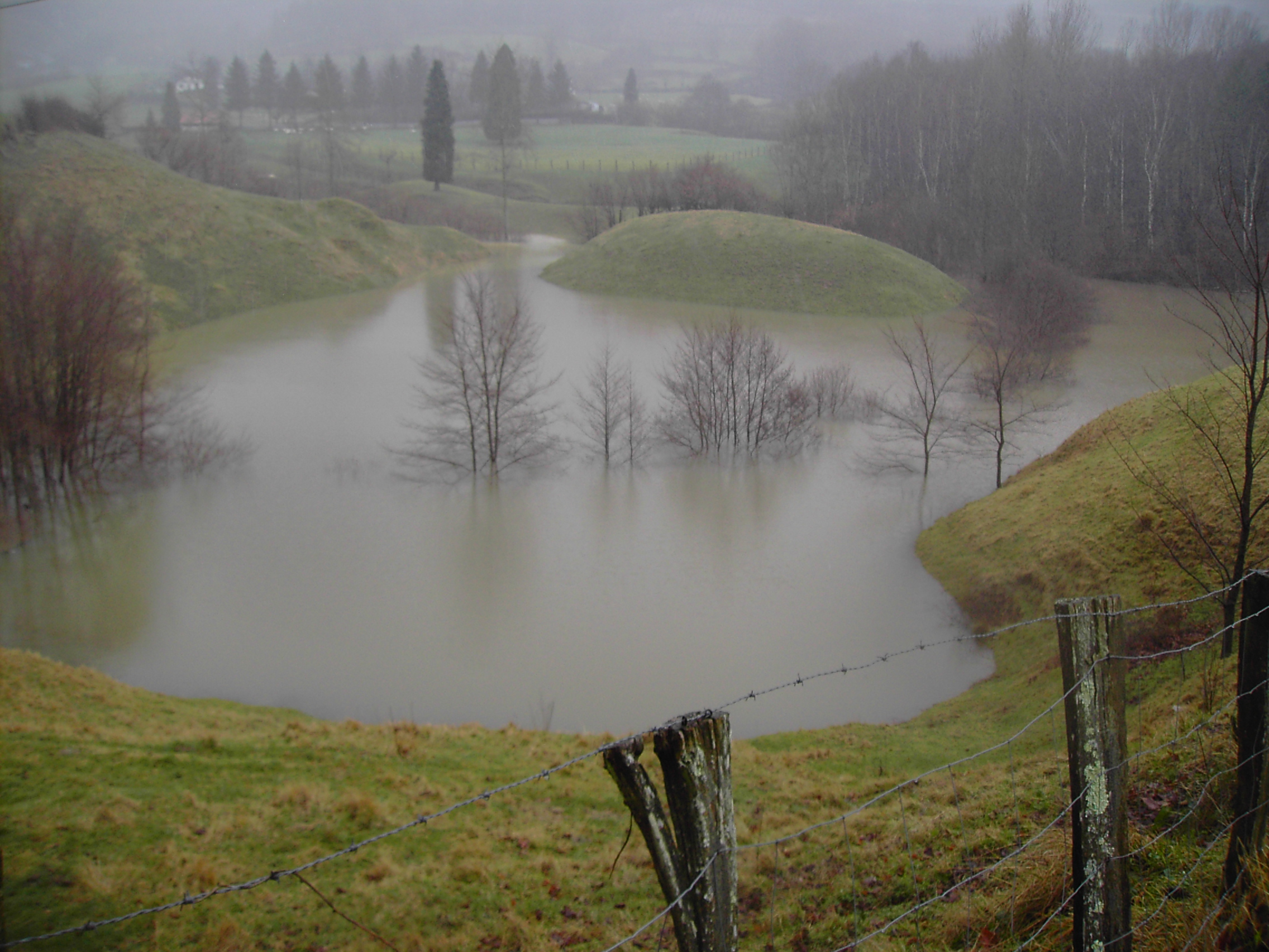 Lindozuloak ezin xurgatu ur guztia eta aintzira sortzen da ustu bitartean.